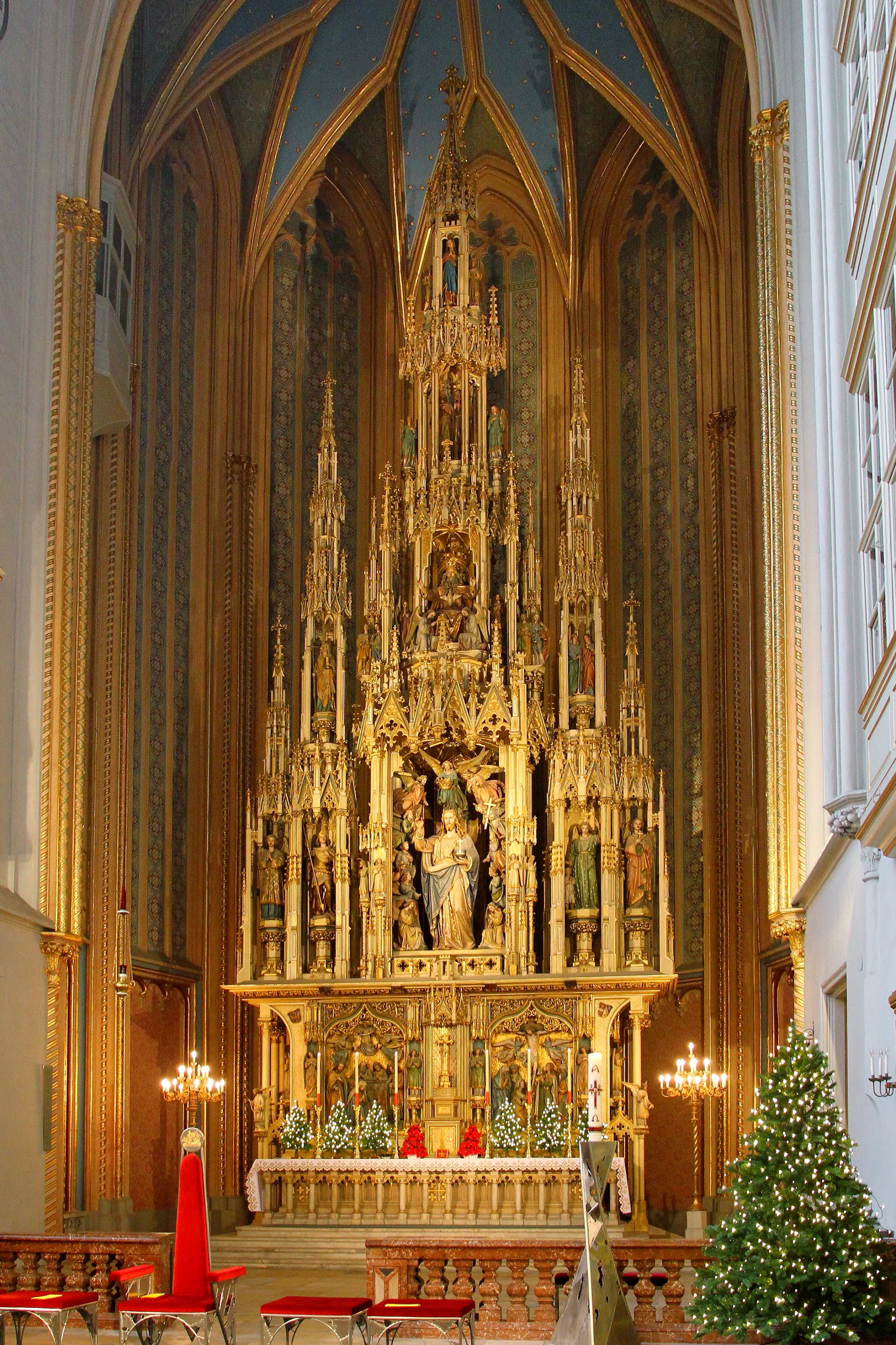 Der steinerne, polychromierte Hochaltar der Wiener Augustinerkirche. Von dem Bildhauer Andreas Halbig von 1857 bis 1869 gefertigt. Ursprünglich war er für die Wiener Votivkirche bestimmt. Heinrich von Ferstel, der Erbauer der Votivkirche, lehnte jedoch den Altar ab, weil er den Durchblick auf den Chorumgang verhindert hätte, daher wurde der Altar 1873 in der Augustinerkirche aufgestellt.